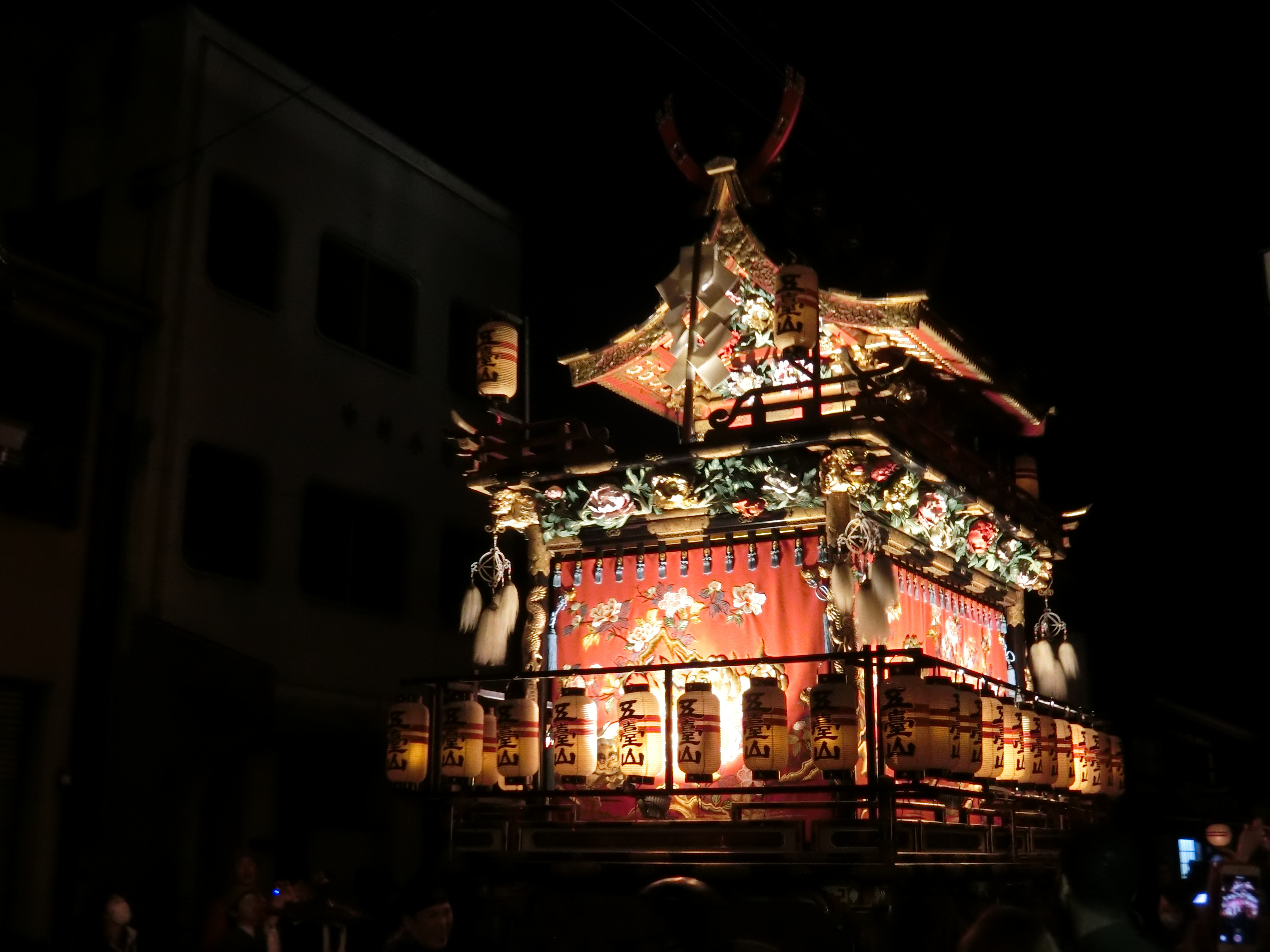 Takayama festival Night procession.